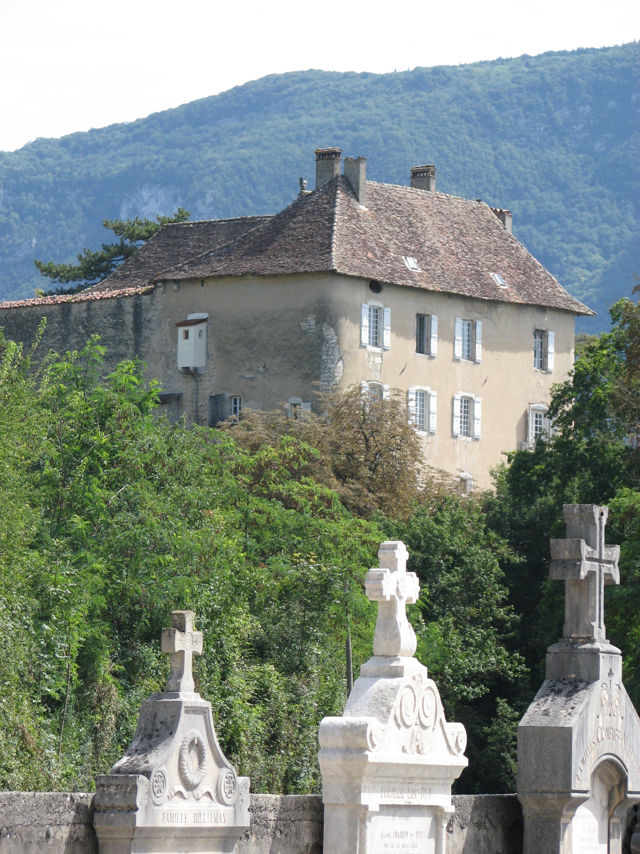 Château de Murs, sur la commune de Murs-et-Gélignieux (Ain). Avec le cimetière au premier plan.